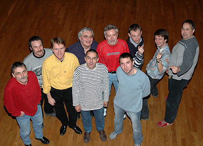 De gauche à droite, Jean-Louis, Stéphane, François, Italo, Didier, Dominique, Mikaël, Thierry, Pierre-Philippe et Daniel. Photo : Véronique Marchal